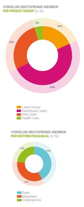 Stat 2014